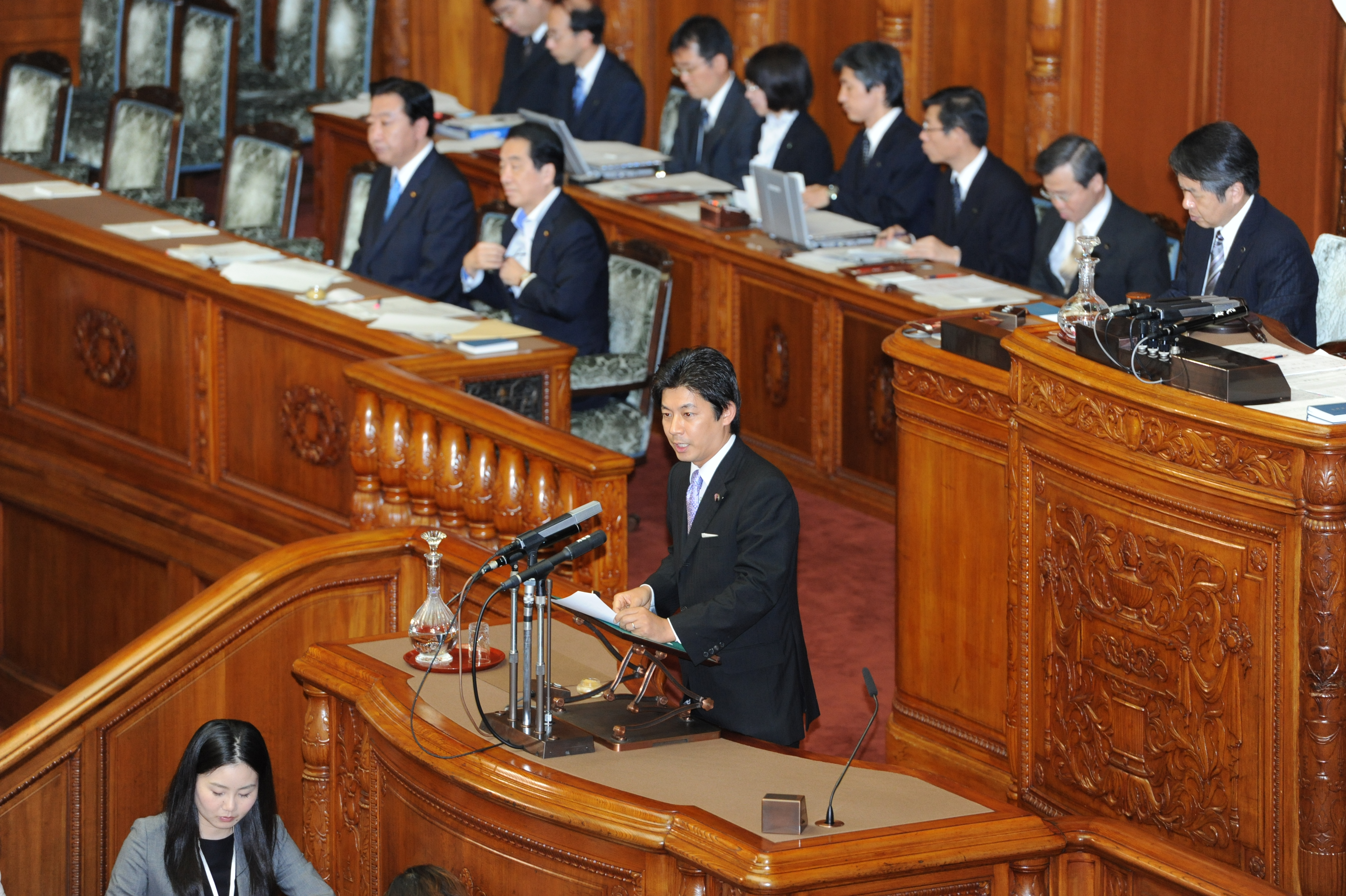 中谷智司参議院議員